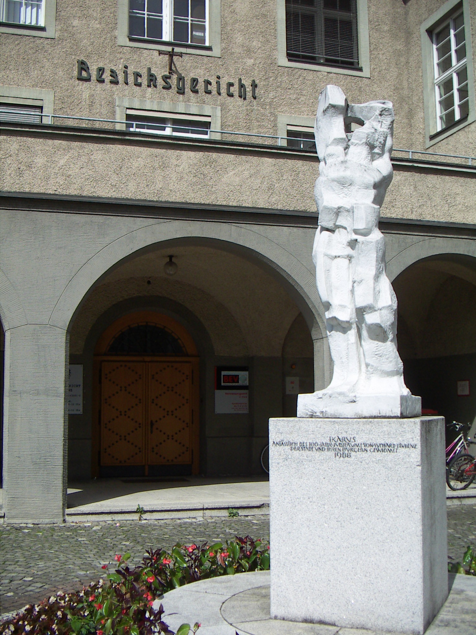 Skulptur Ikarus 1987 von Herbert Albrecht, in Bludenz vor dem Bezirksgericht im Jahre 1988 situiert, der Anlass war: 100 Jahre Suchard Bludenz